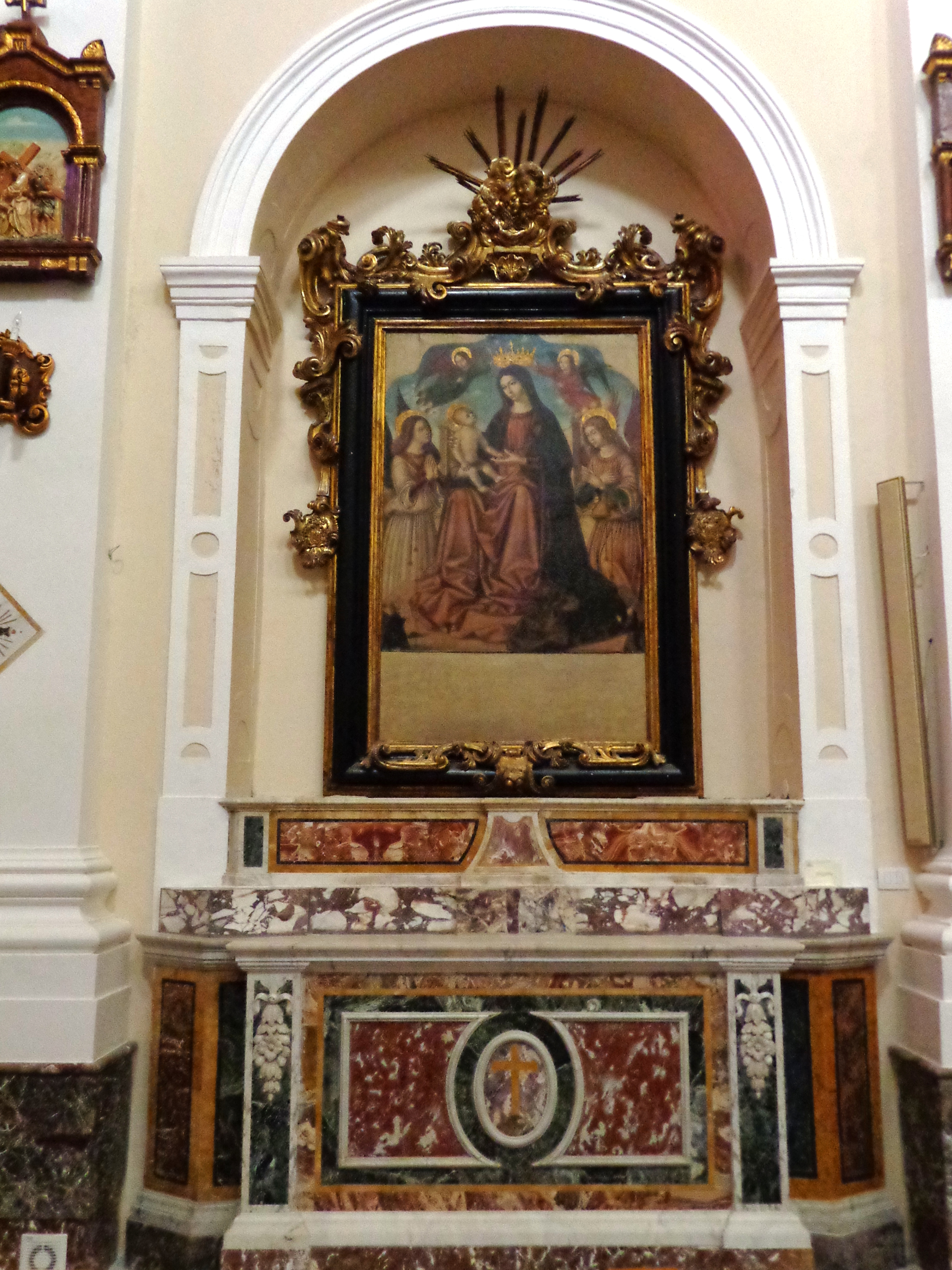 Madonna col Bambino, Antonello de Saliba, cattedrale di San Bartolomeo di Patti